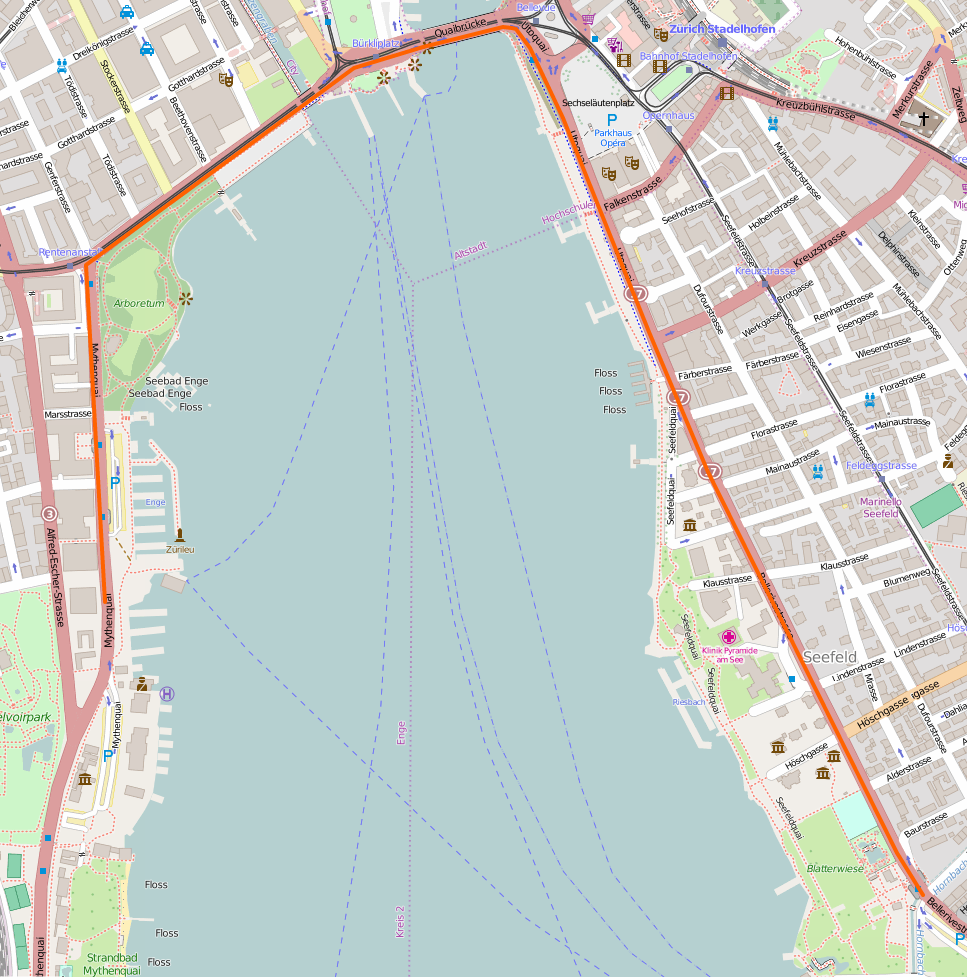 Stadtplan von Zürich mit Verlauf der Route der Streetparade ( orangene Linie), erstellt mit Openstreetmap